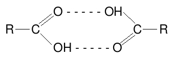 dimeros